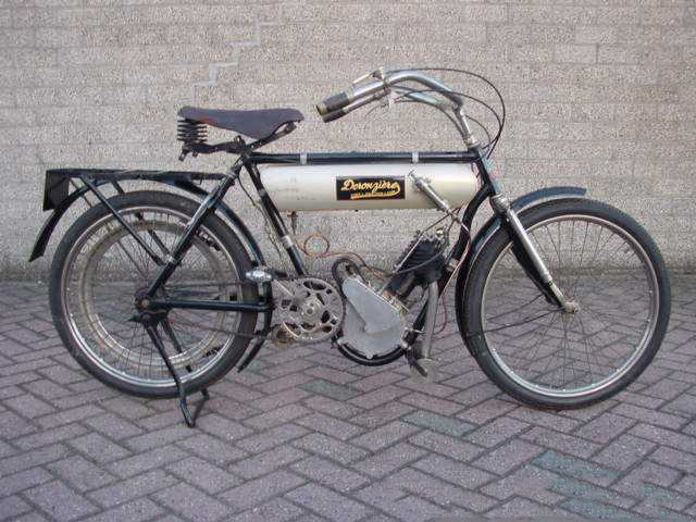 Toestemming van Yesterdays Antique Motorcycles (